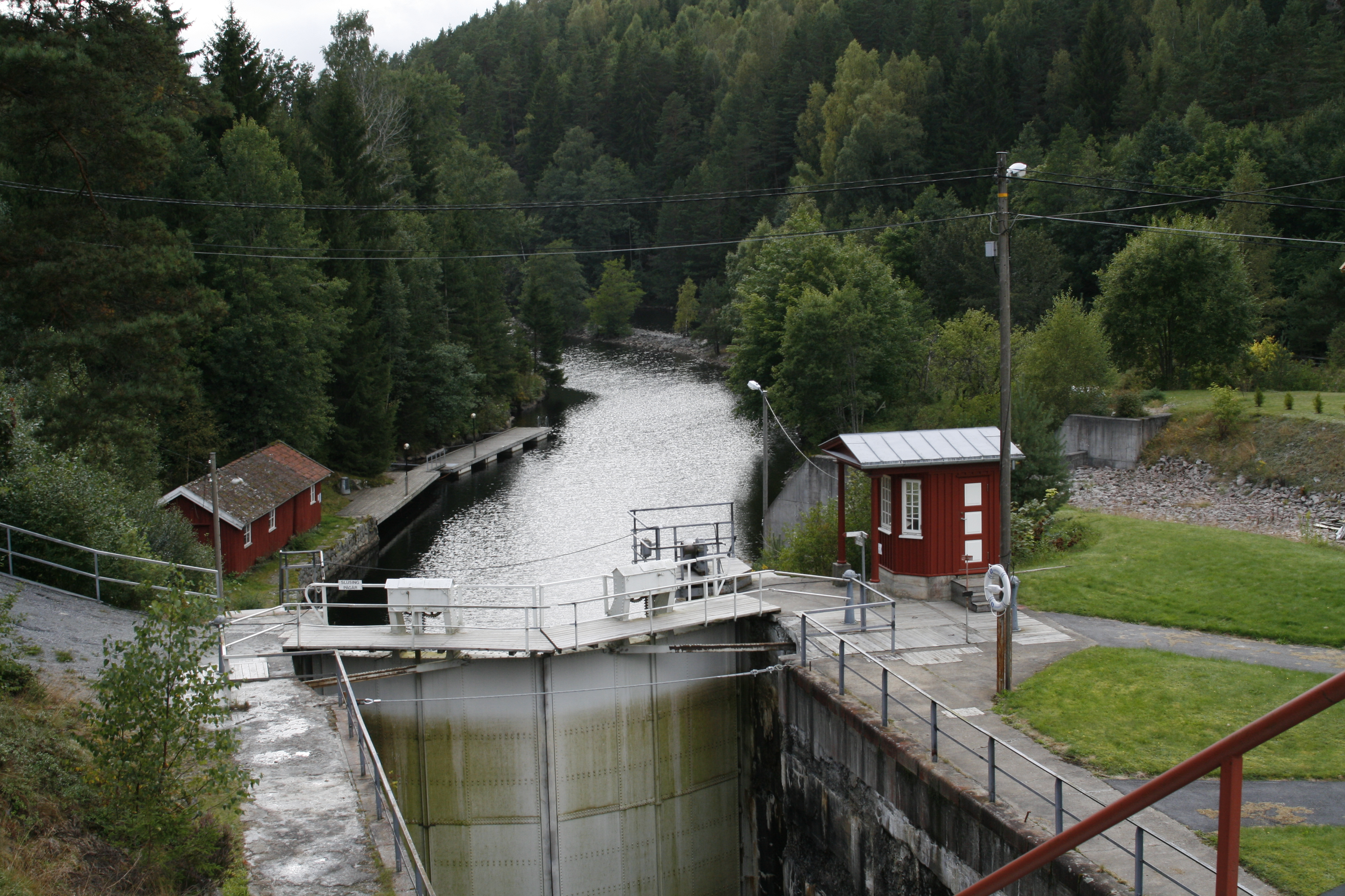 Brekke sluser 2012